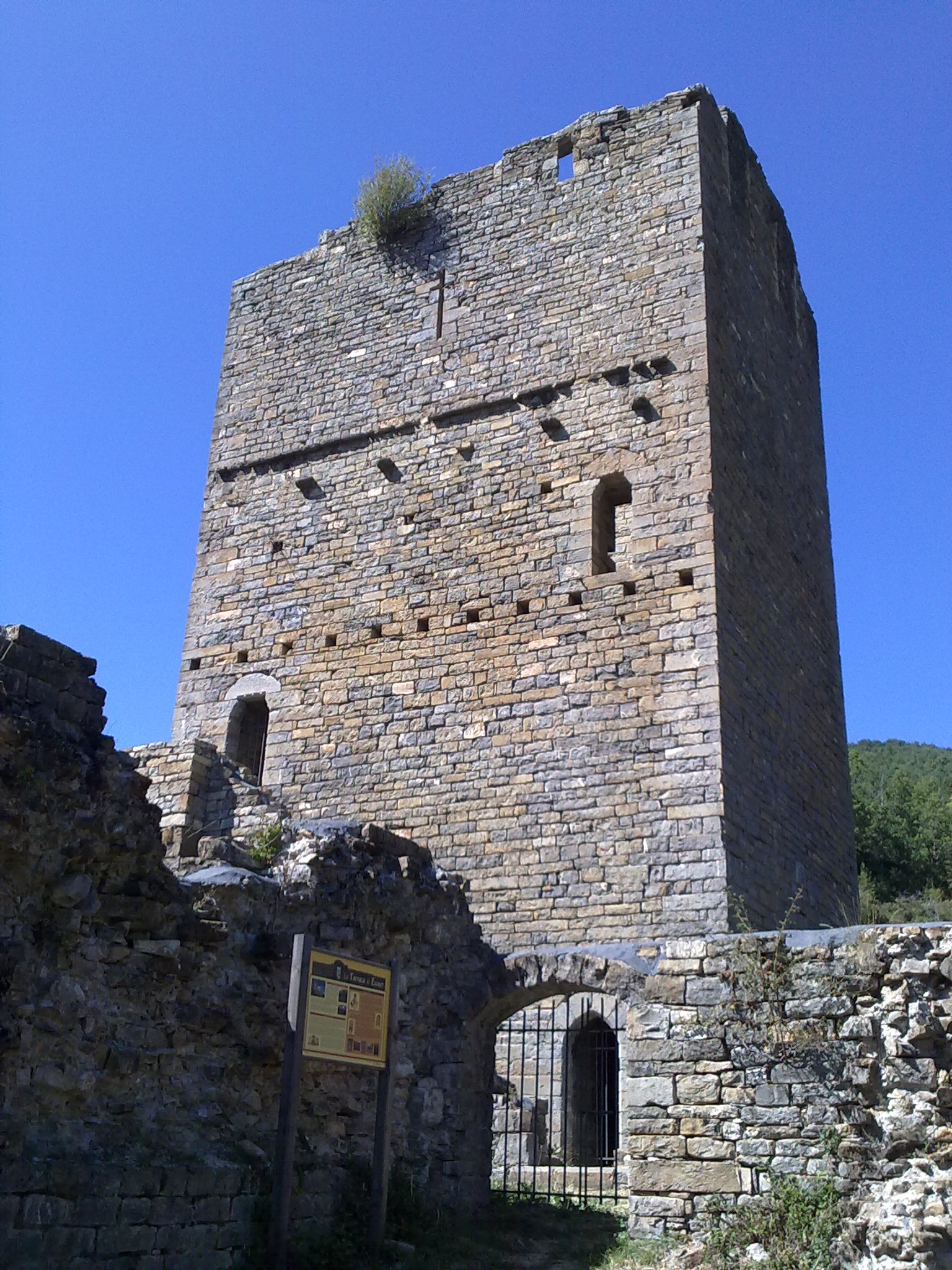 Escuer Alto : Vista de l'entrada a la Torraza d'Escuer